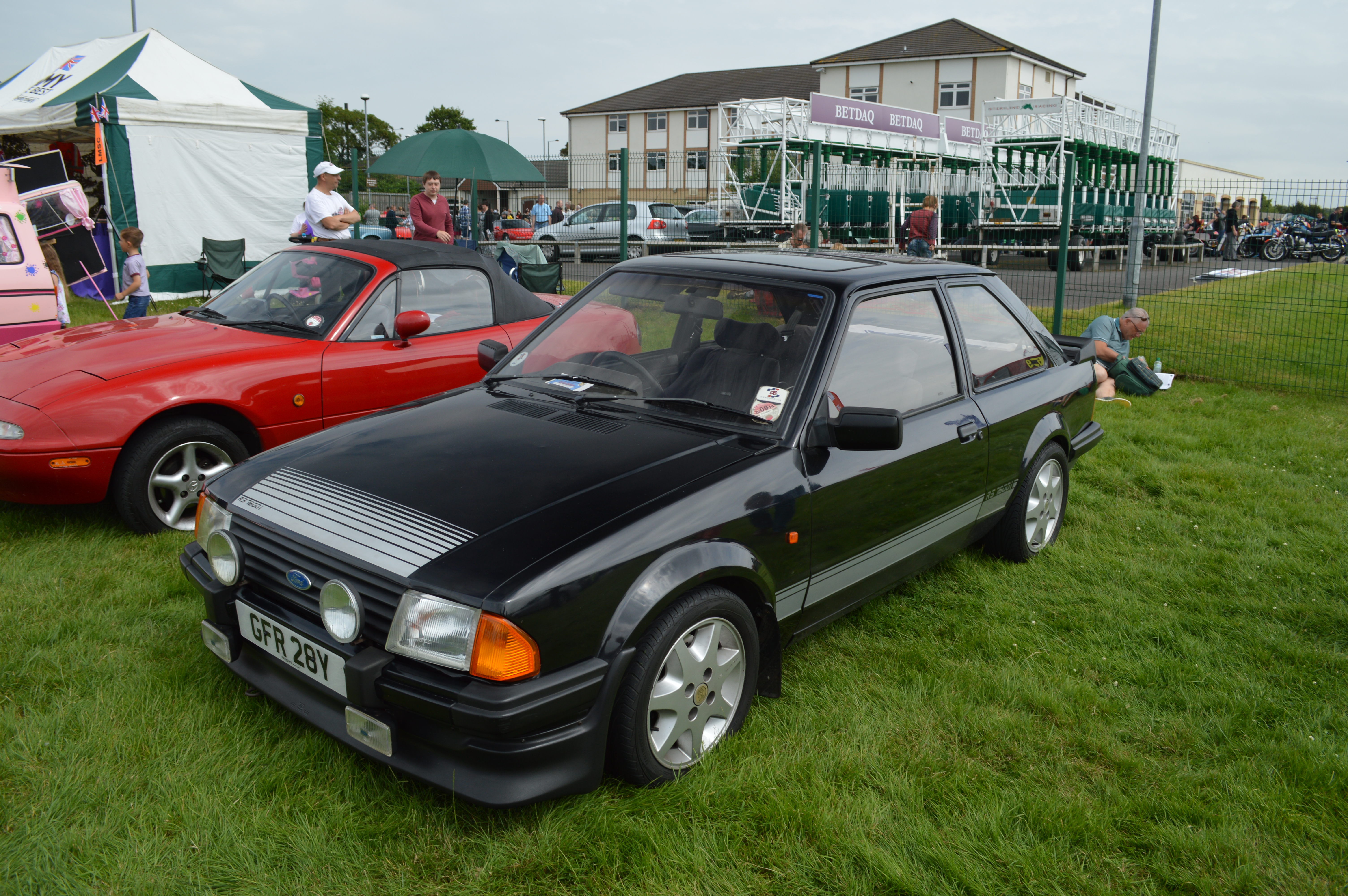 Ford Escort RS1600